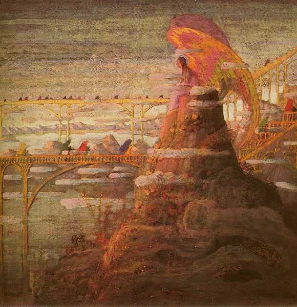 Preludes and Fugues. Angel. Prelude by Mikalojus Konstantinas Čiurlionis